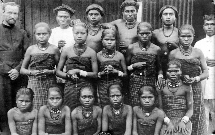 Repronegatief. Groepsportret van een pater met zijn bekeerlingen